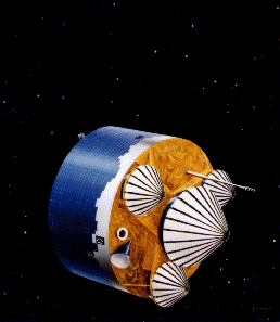 Pioneer Venus 2